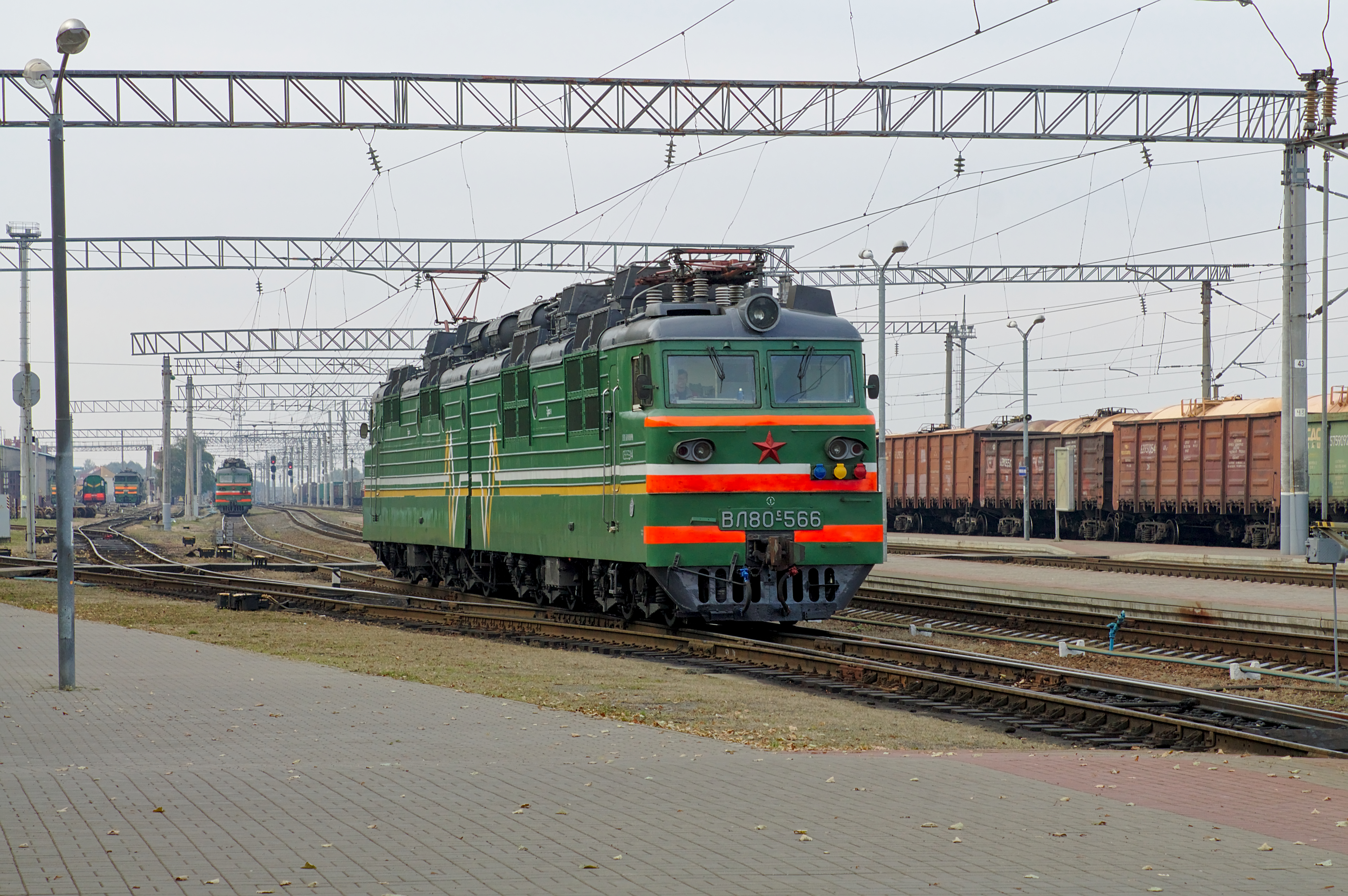 Электровоз ВЛ80С-566, станция Молодечно см. фото 704853 в альбоме автора